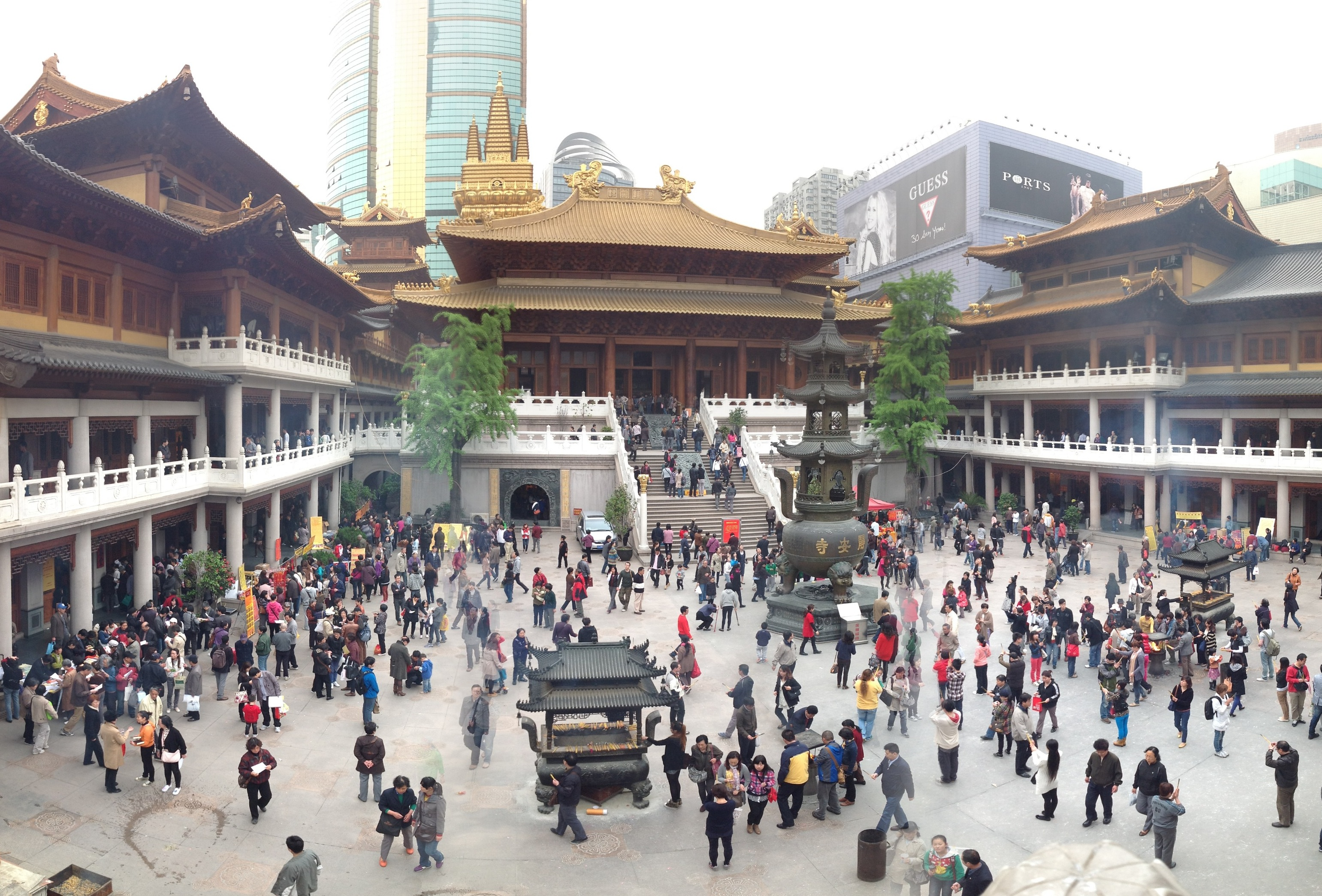 Ansicht des Jing'an Tempels in Shanghai von der Hauptpforte aus gesehen.